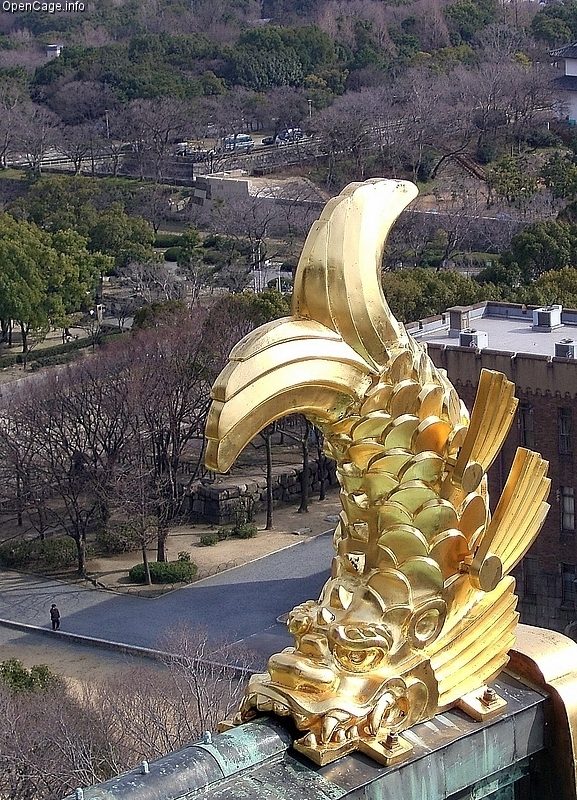 大阪城の鯱（しゃちほこ）